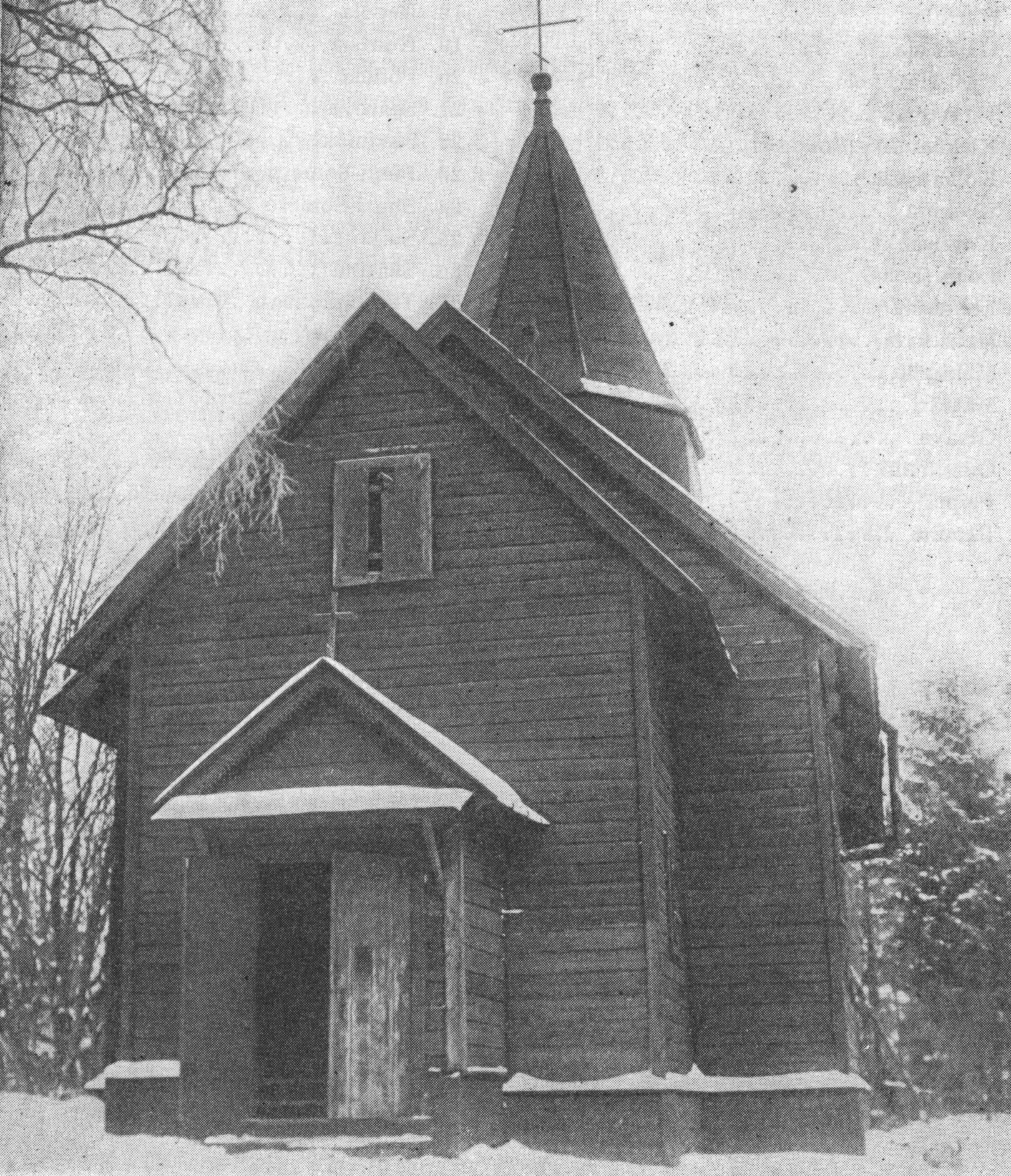 Кирха прихода Новасолкка.